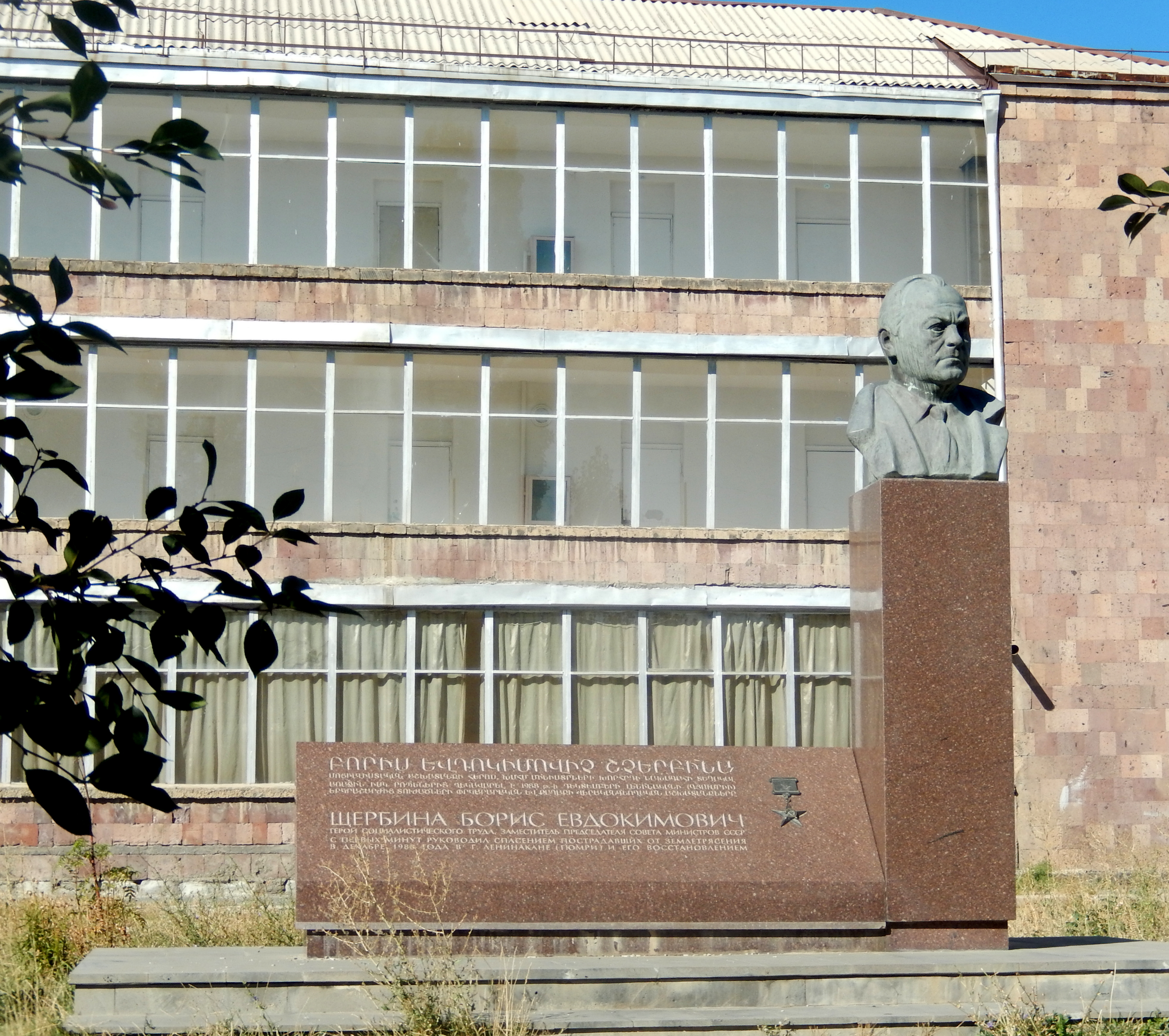 Բորիս Եվդոկիմովիչ Շչերբինայի հուշարձանը Գյումրիիում 1/4